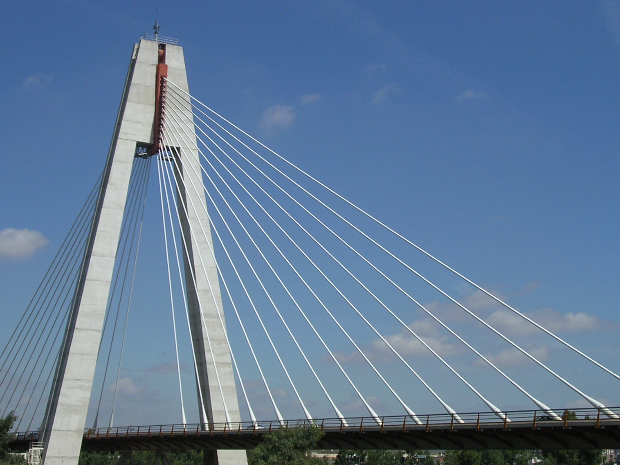 Puente Real de Badajoz